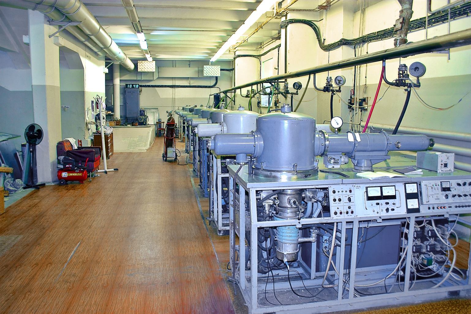 Установки Сапфир-2м компании ТАЙРУС для выращивания ювелирного алекс